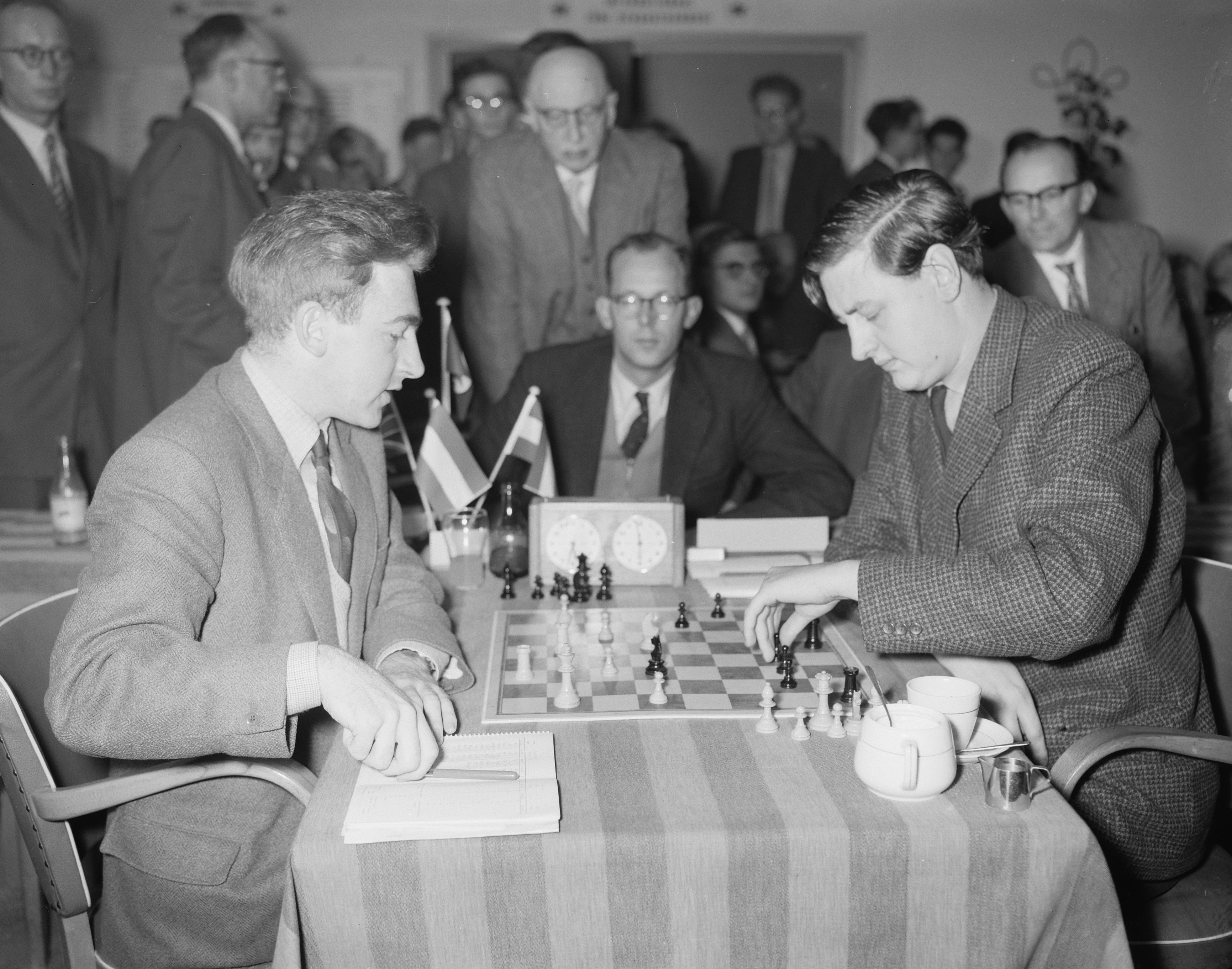 Collectie / Archief : Fotocollectie Anefo Reportage / Serie : [ onbekend ] Beschrijving : Peter Hugh Clarke (links) en Donner (rechts) Datum : 26 november 1957 Trefwoorden : schaken Persoonsnaam : Clark Fotograaf : Bilsen, Joop van / Anefo Auteursrechthebbende : Nationaal Archief Materiaalsoort : Negatief (zwart/wit) Nummer archiefinventaris : bekijk toegang 2.24.01.04 Bestanddeelnummer : 909-1460